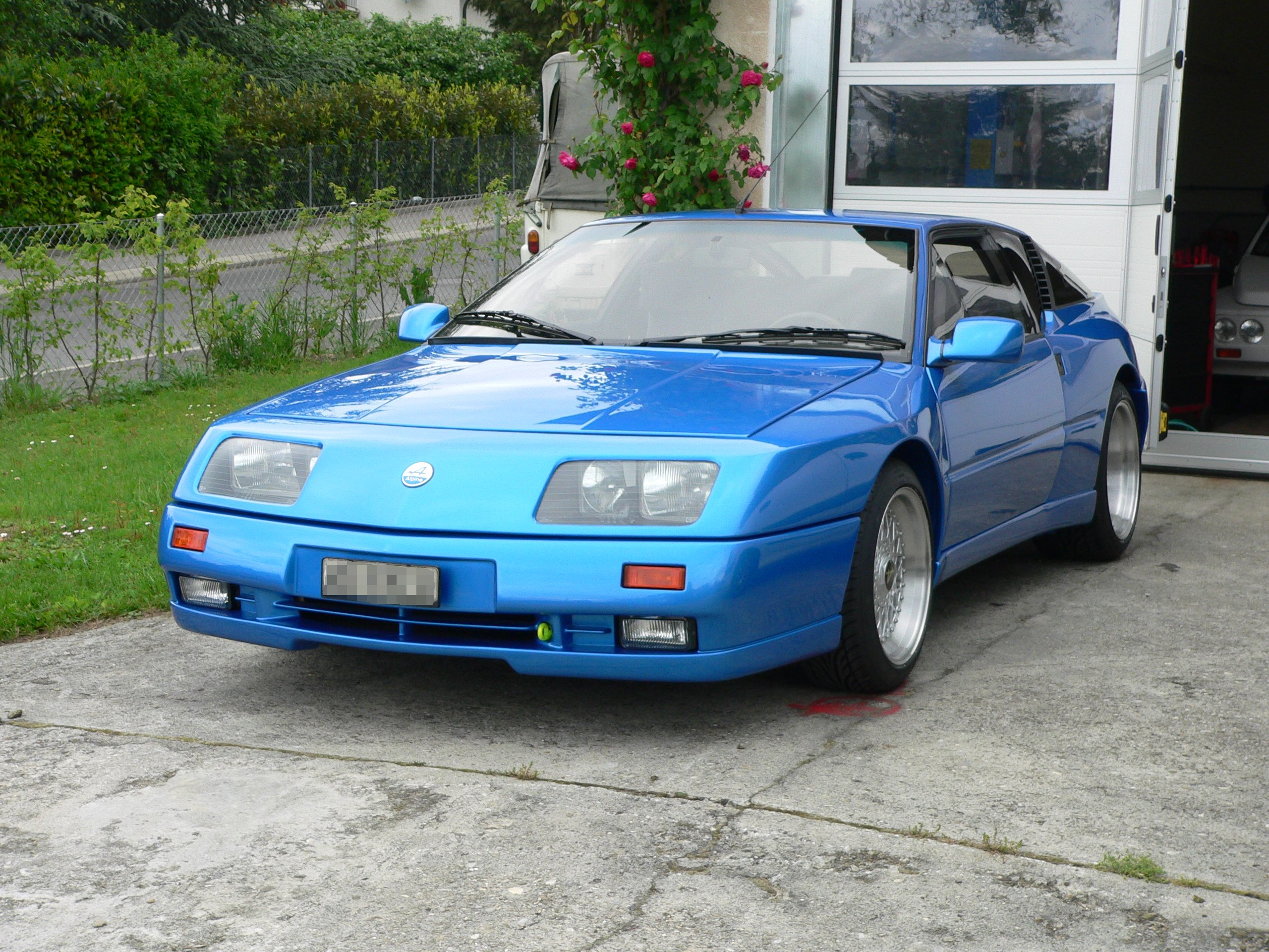 Renault Alpine GTA